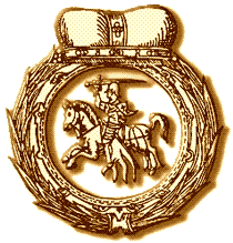 «Пагоня», з тытульнага аркуша Літоўскага Статута (1588)